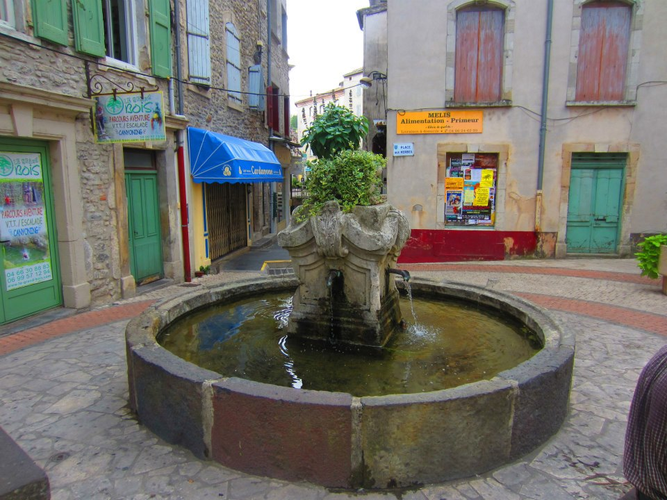 Saint-Ambroix, Gard.